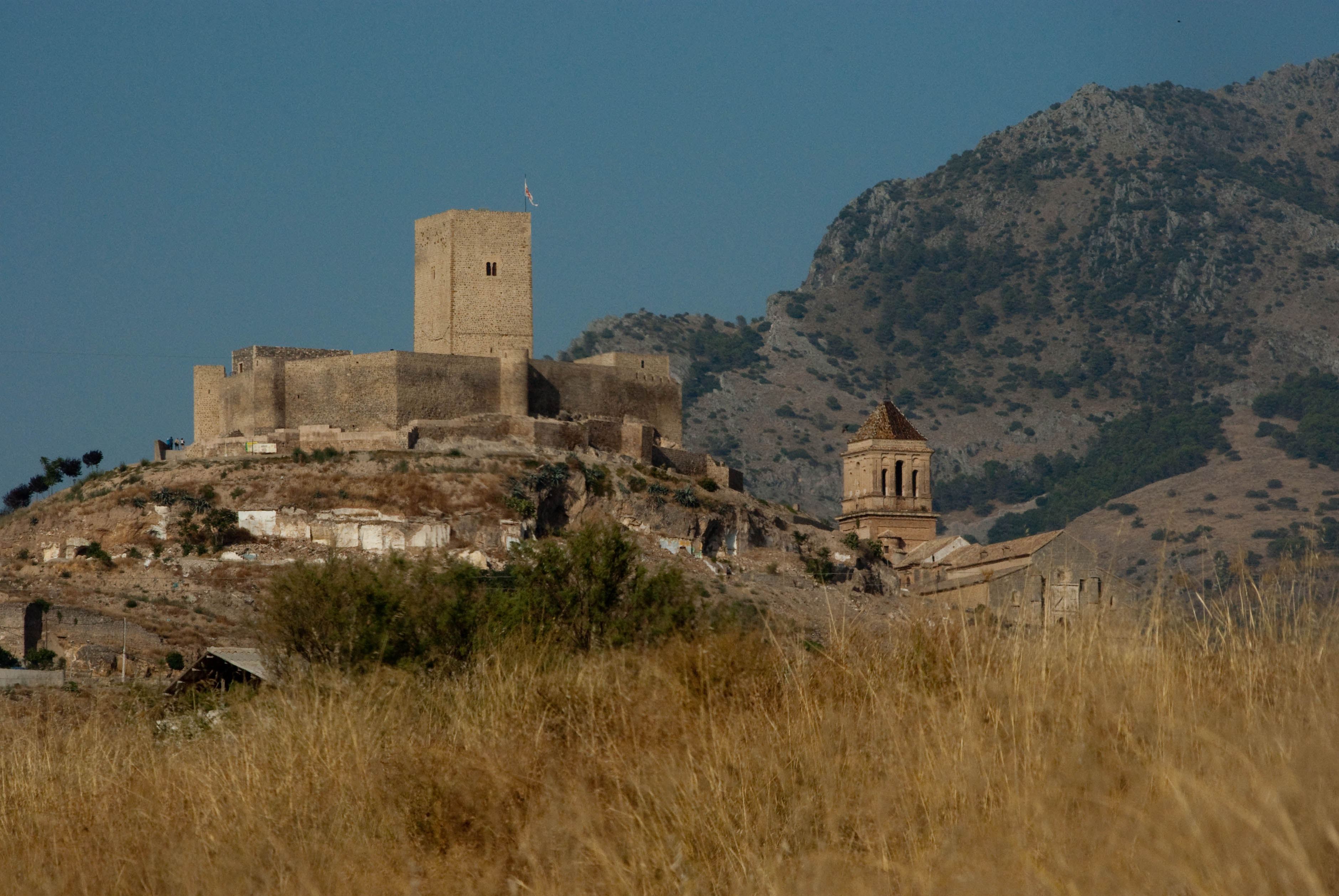 Castillo de Alcaudete, Jaén, España